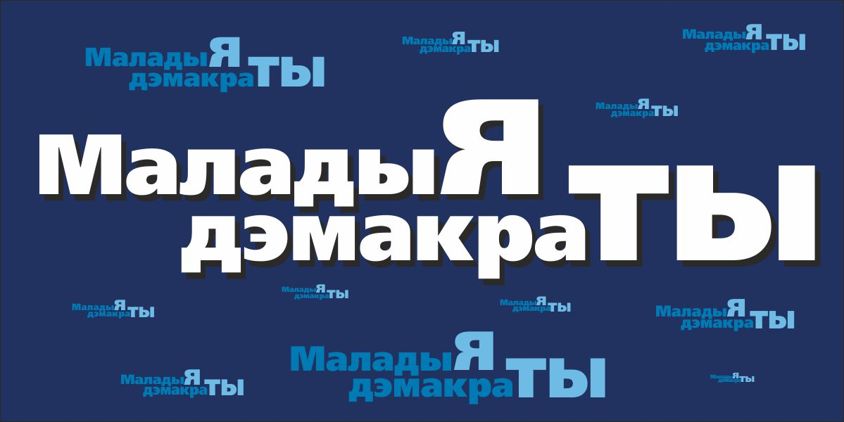 молодежное крыло Объединённой гражданской партии